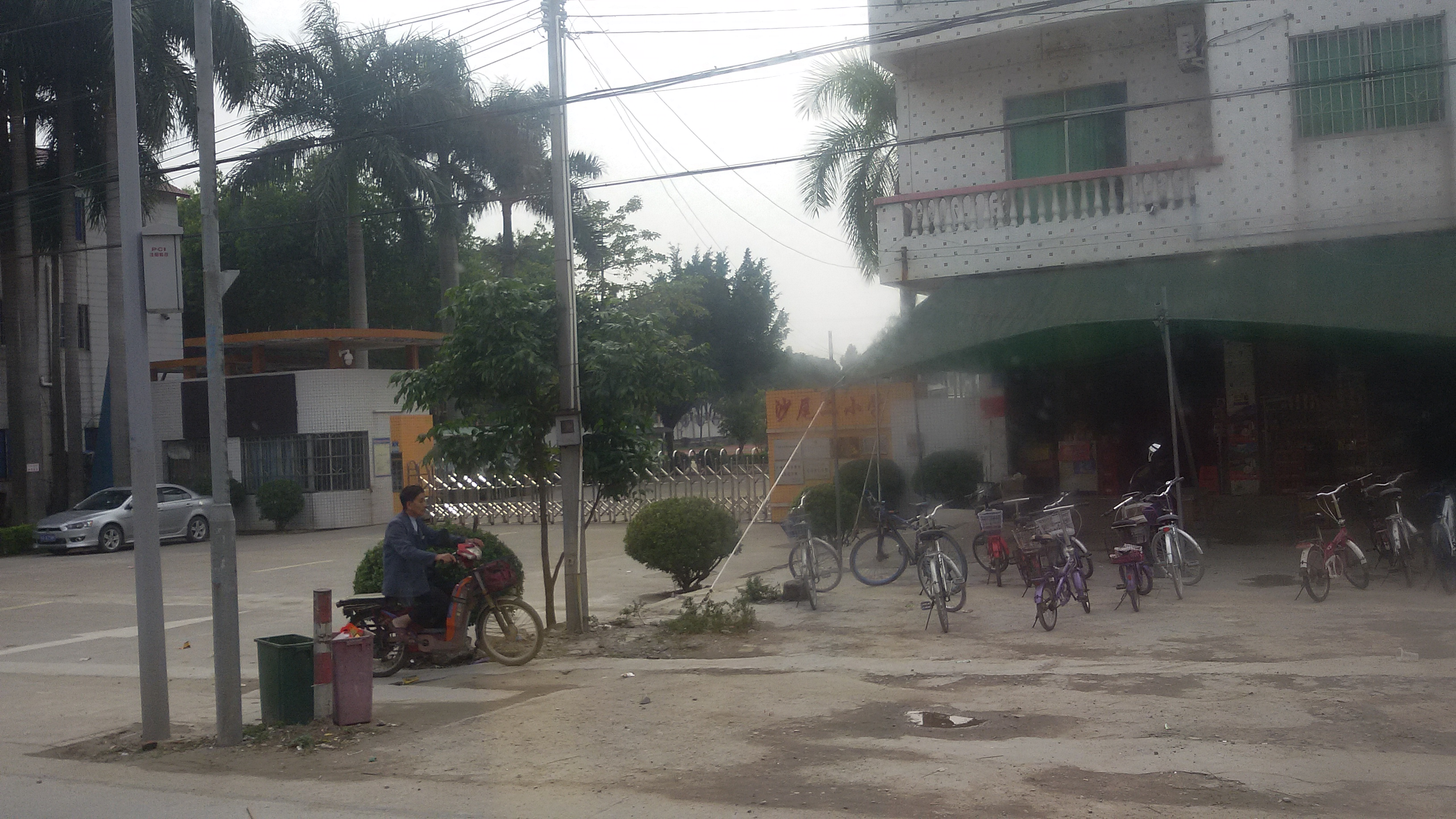 粵語: 沙尾二小正门